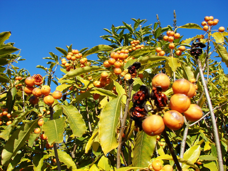 Santuario de la Naturaleza Palmar El salto. Quebrada Rodelillo